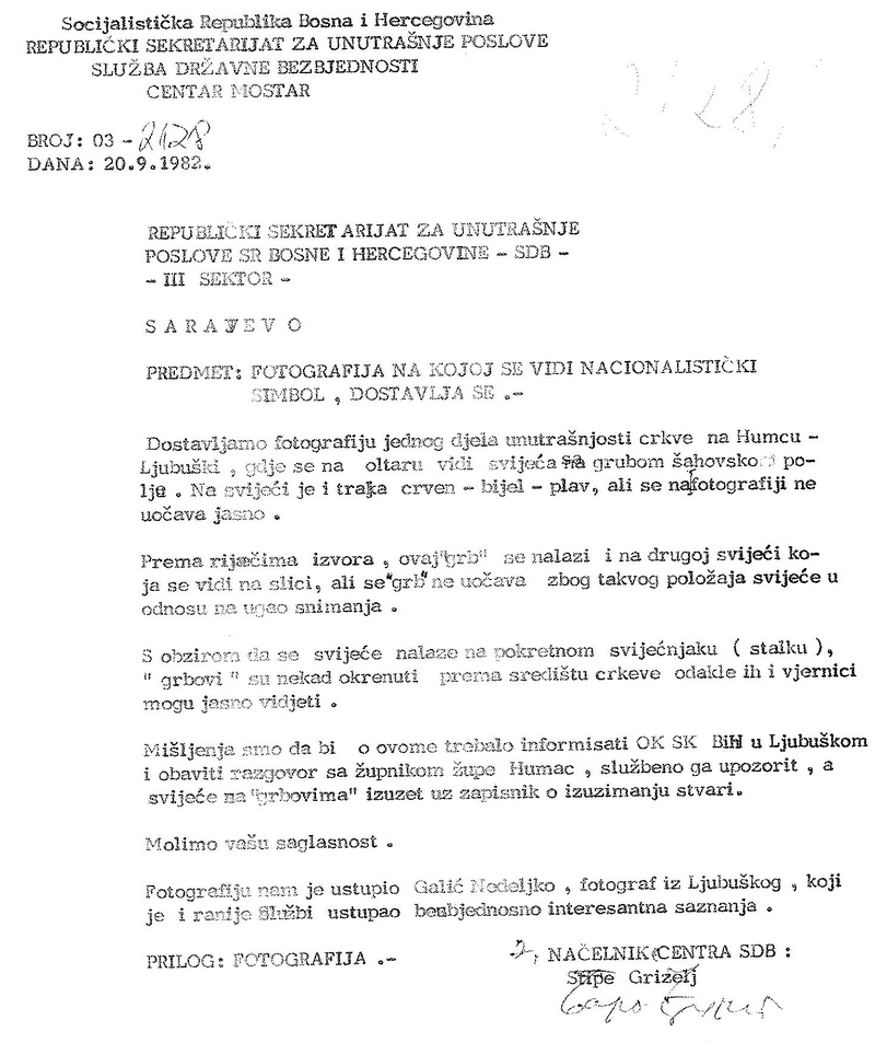 prijava za udbu.N. Galić.